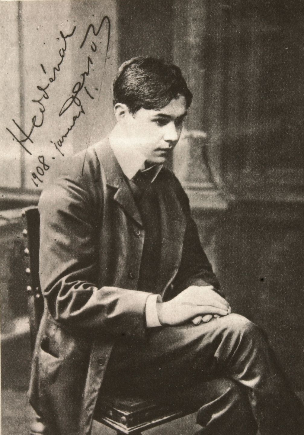 Kosztolányi Dezső 1908-ban